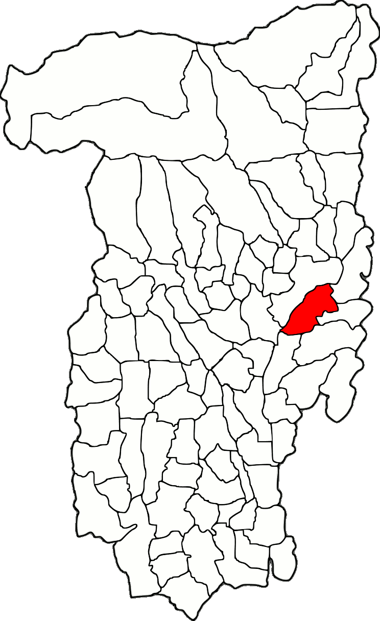 Lage der Gemeinde Budești im Kreis Vâlcea (RO).